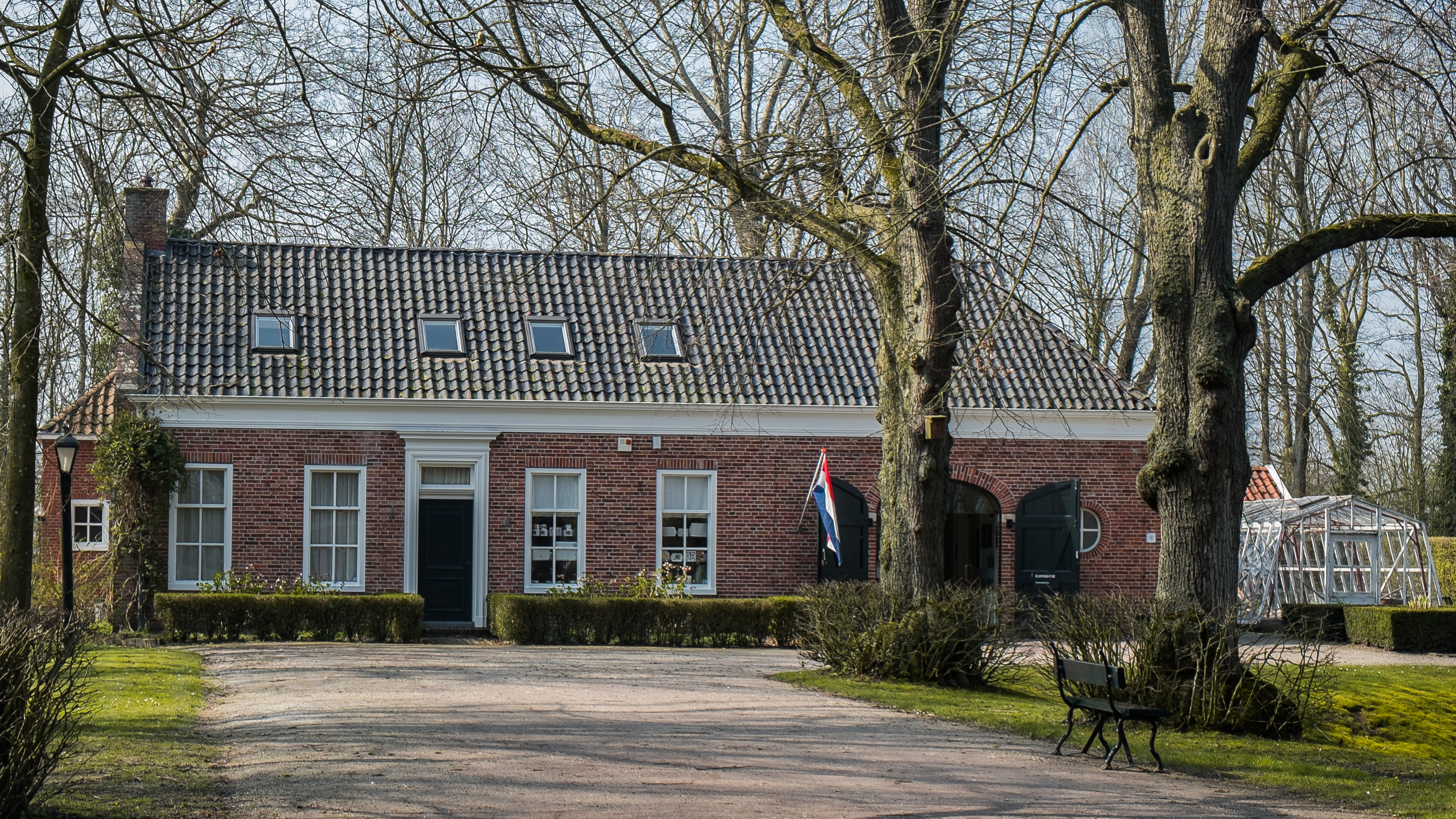 Koetshuis van Verhildersum